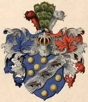 Maydelli suguvõsa parunivapp (Kuramaa liin)